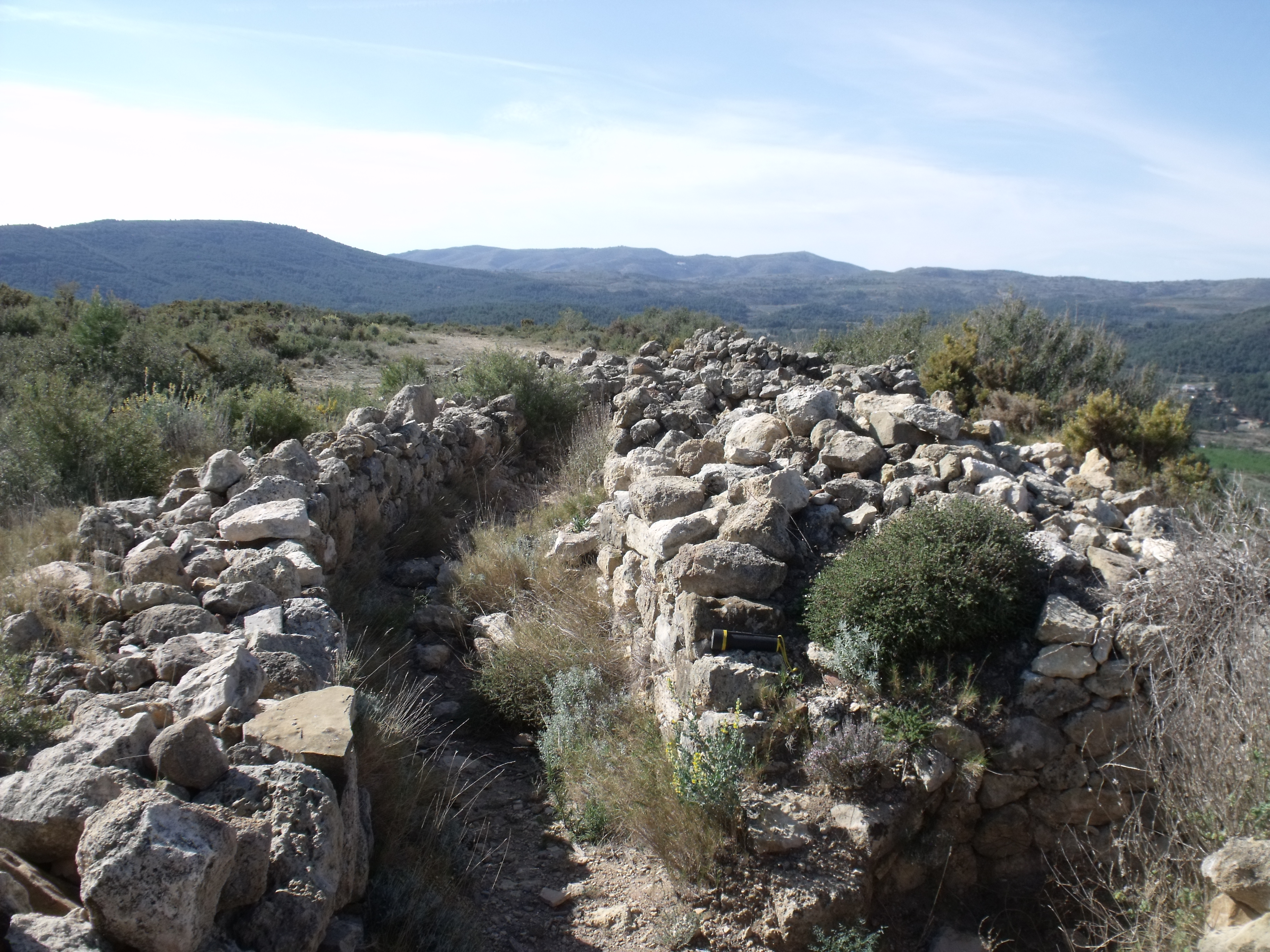 Posición de la línea XYZ.